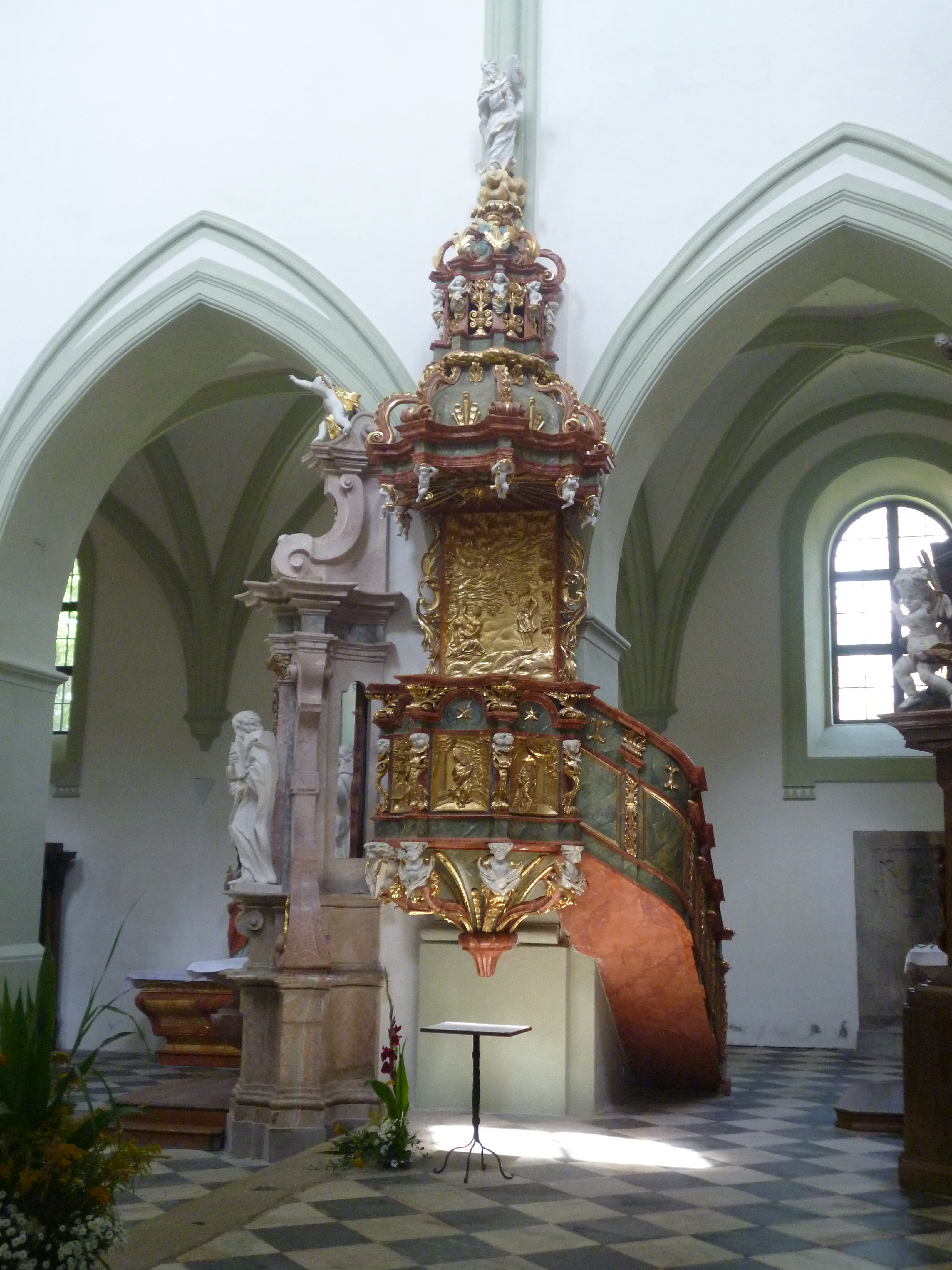 Zámek Žďár nad Sázavou s areálem, Zámek 1/1, 2/2, 3/3, 4/4, 5/5, 6/6, 8/8, 9/9, 10/10, 13/13, 53/11, 54/12, Santiniho 64/11, Zámek Žďár, Žďár nad Sázavou.